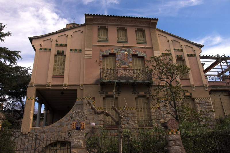 Casa Juli Barbey i Poinsard (la Garriga, Vallès Oriental, Catalunya), obra de Joaquim Raspall 1910